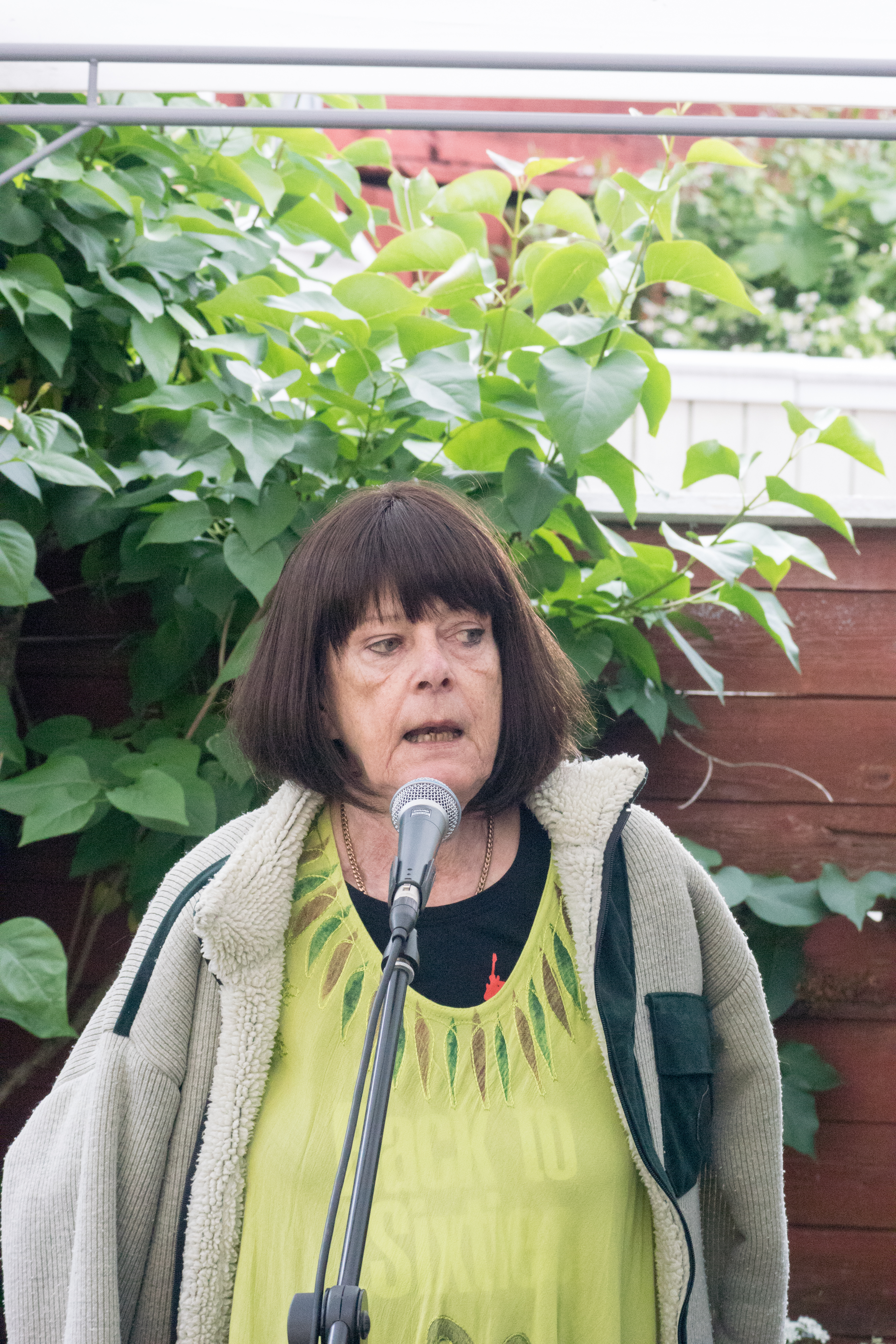 Päivi paunu suomalainen laulaja